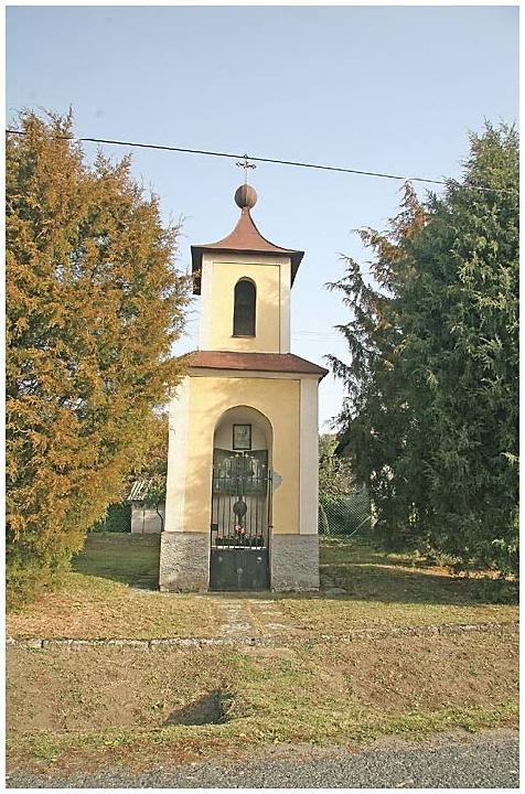 Výklenková kaple v obci Brambory, district Kutná Hora autor: Prazak date: 9. 2006